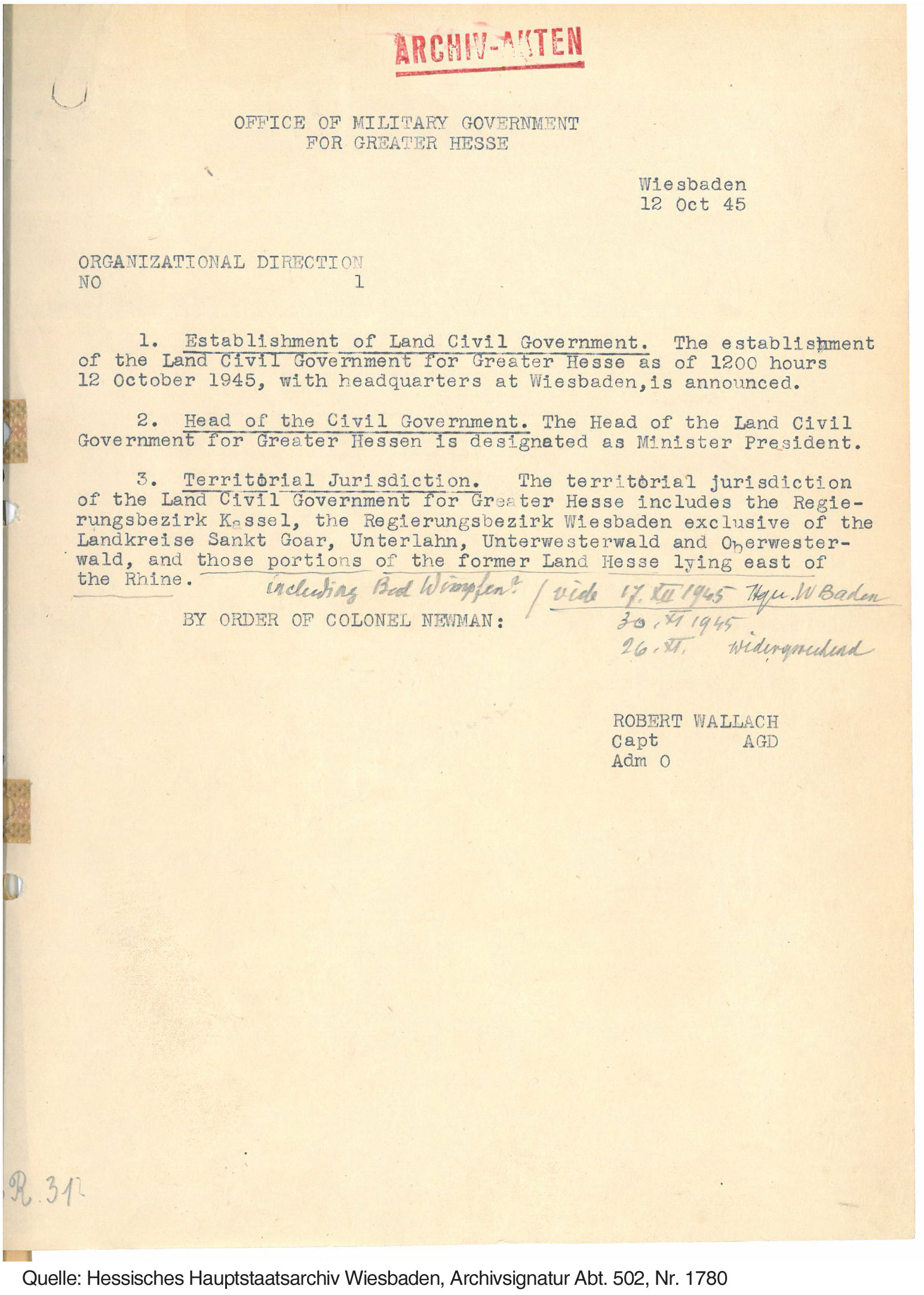 Organisationsverfügung Nr. 1 der Amerikanischen Militärregierung für Groß-Hessen von Col. Newman. Durch diese Verfügung wurde Wiesbaden offiziell zum Sitz der Regierung bestimmt.